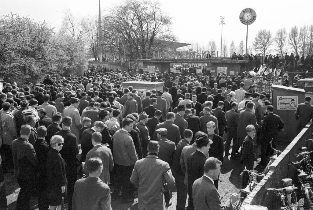 im Holsteinstadion. 17.000 Zuschauer strömen ins Stadion.